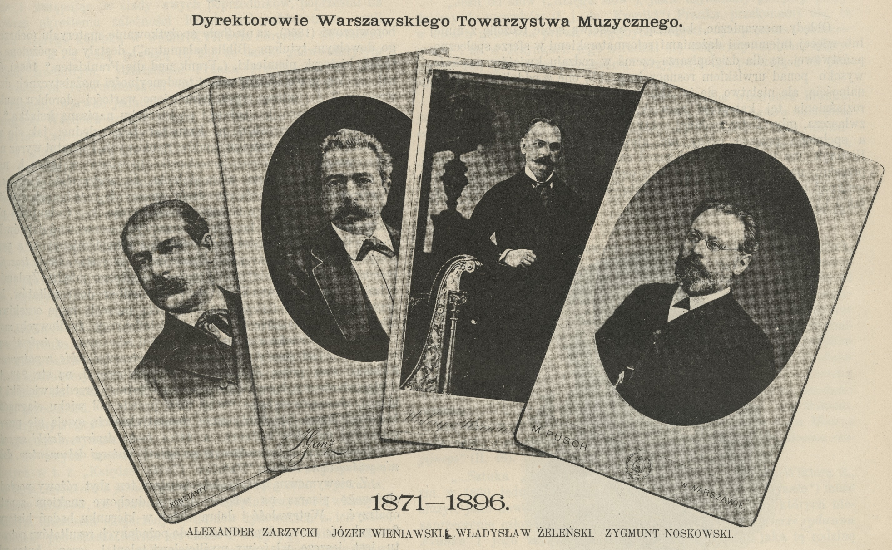 Dyrektorowie Warszawskiego Towarzystwa Muzycznego 1871-1896: Zygmunt Noskowski; Józef Wieniawski; Aleksander Zarzycki; Władysław Żeleński